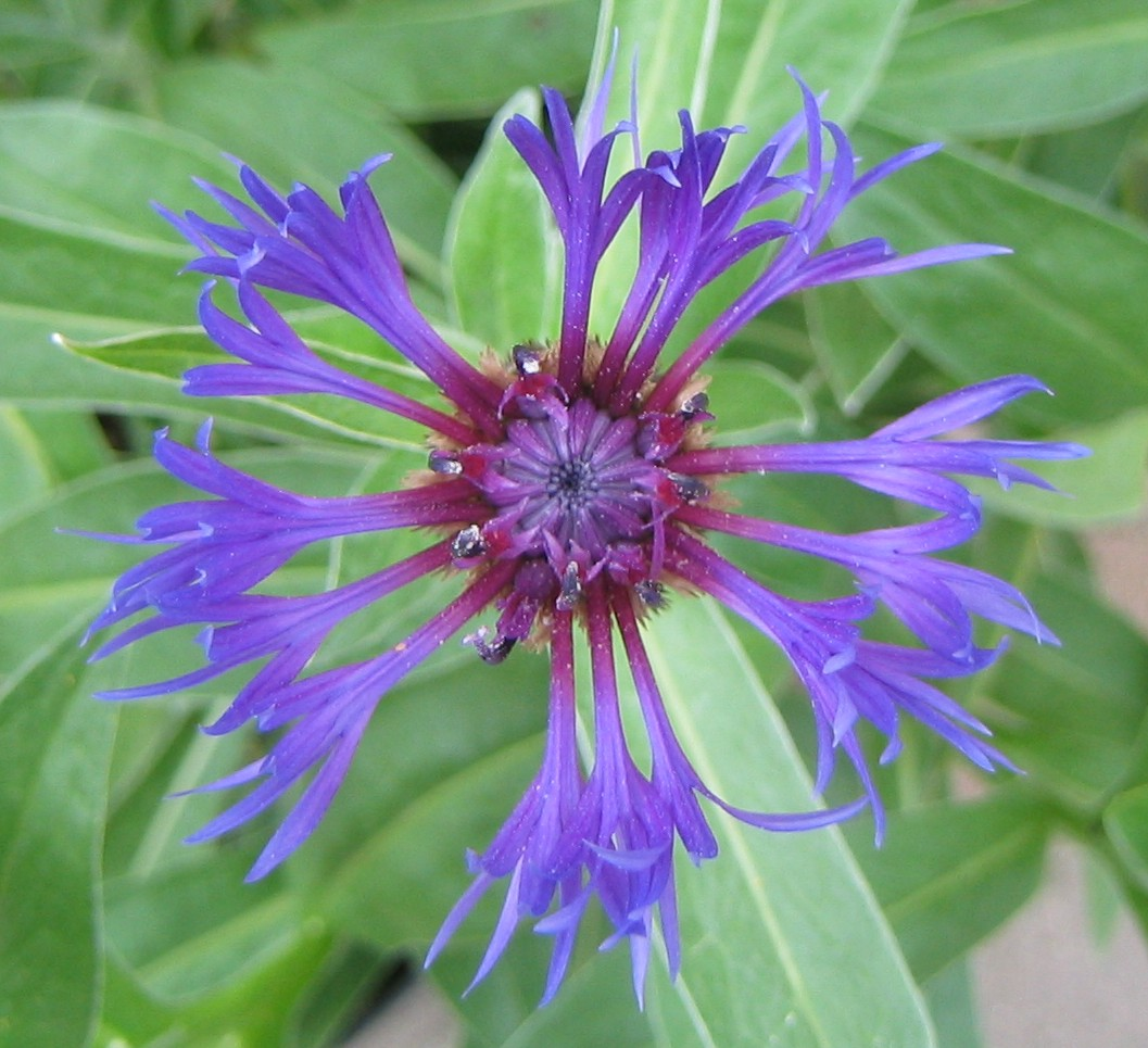 Bloem van de blauwe korenbloem (Centaurea montana).